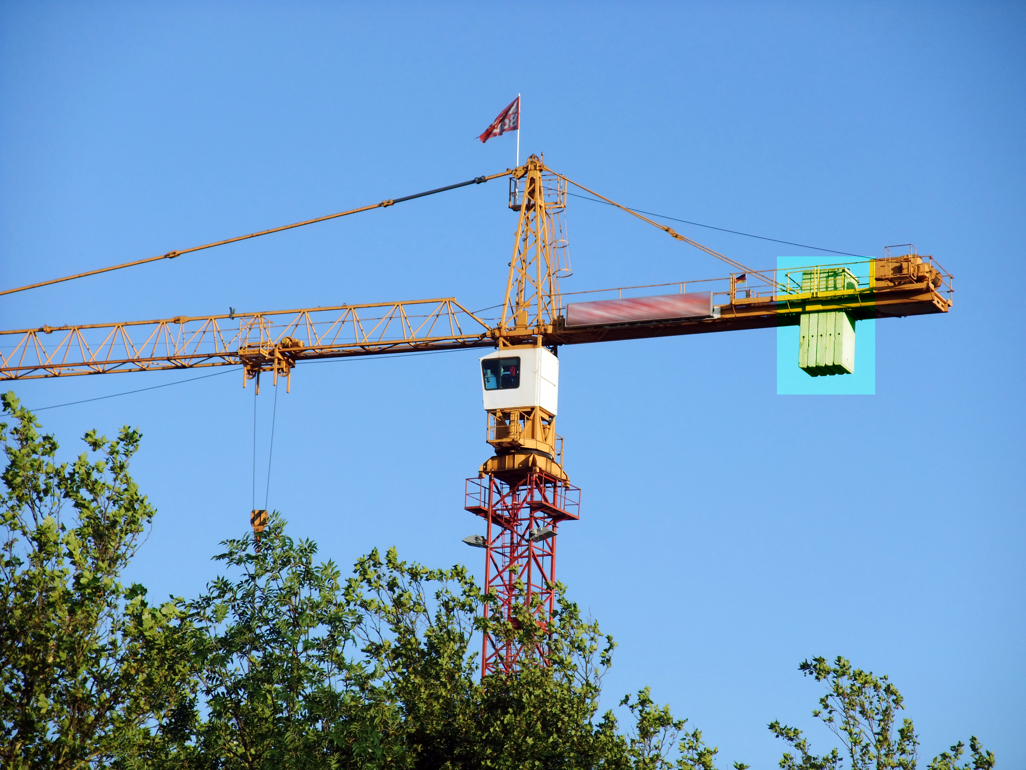 Géigenausleeërballast un engem Tuermkran.